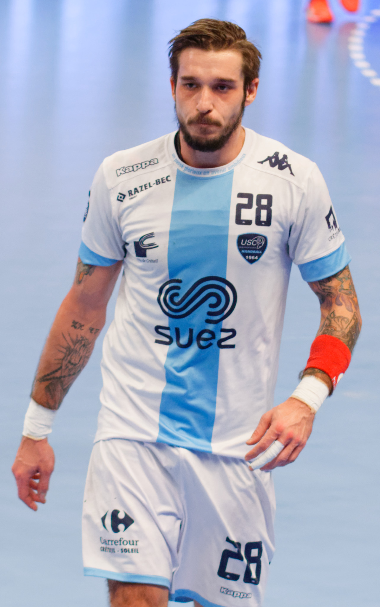 Rencontre de championnat de LidlStarLigue entre le PSG et l'US Créteil. A Coubertin, le 14 décembre 2016.